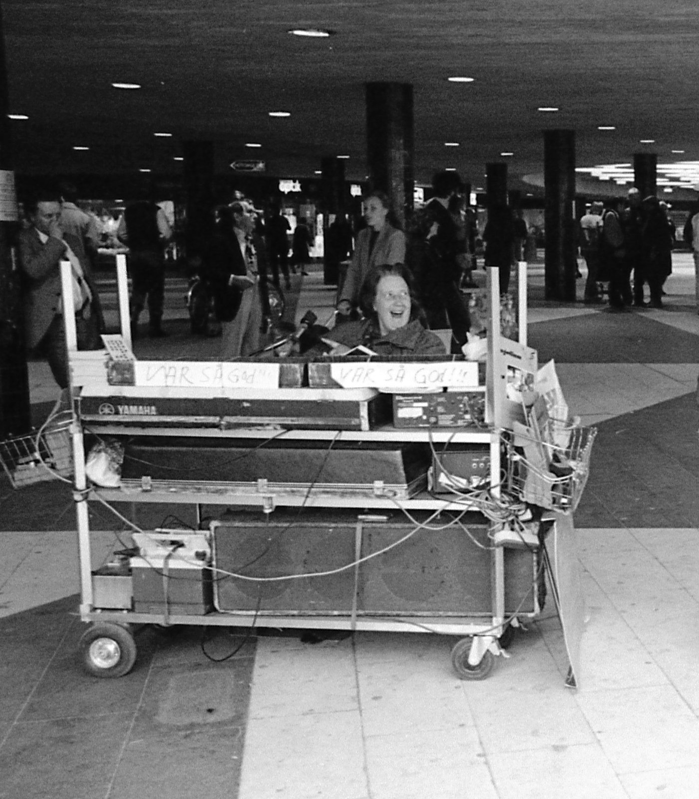 Maria Johansson "Marias enmansorkester"